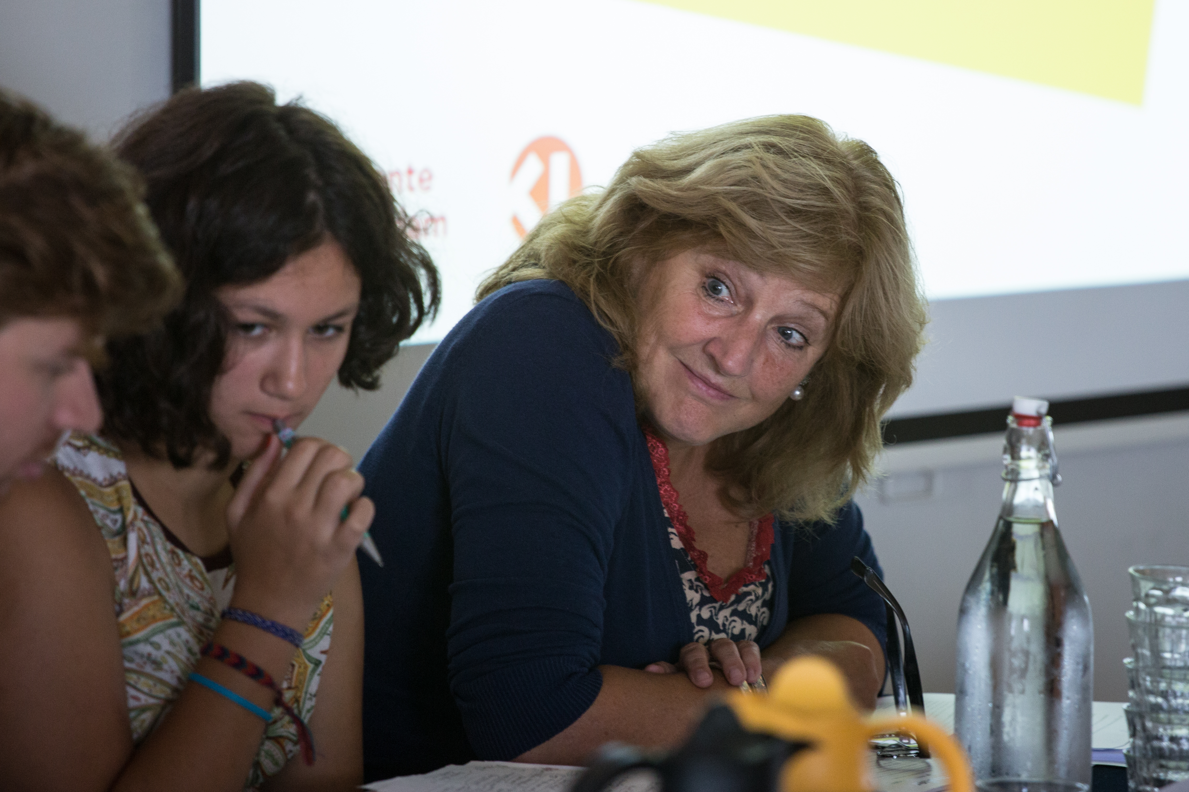 Meryem en juryvoorzitter Aleid Truijens